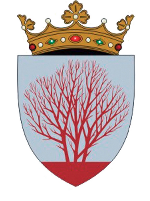 Stema raionul Sângerei adoptată la 14 septembrie 2005